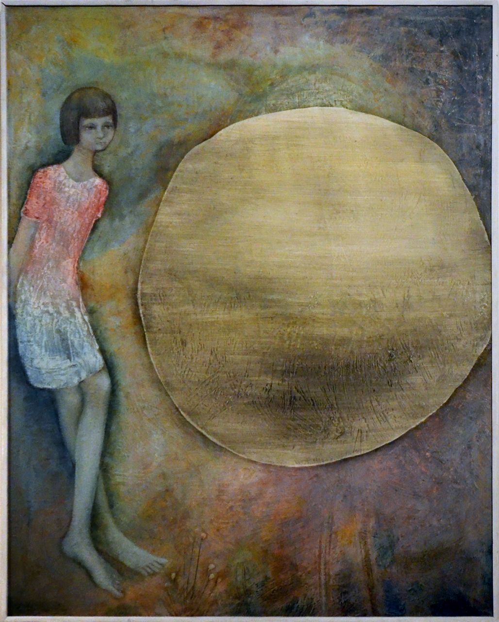 Stanislav Podhrázský, Jana (1966), olej